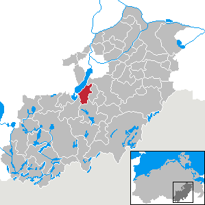 Groß Nemerow in Mecklenburg-Vorpommern, Landkreis Mecklenburg-Strelitz